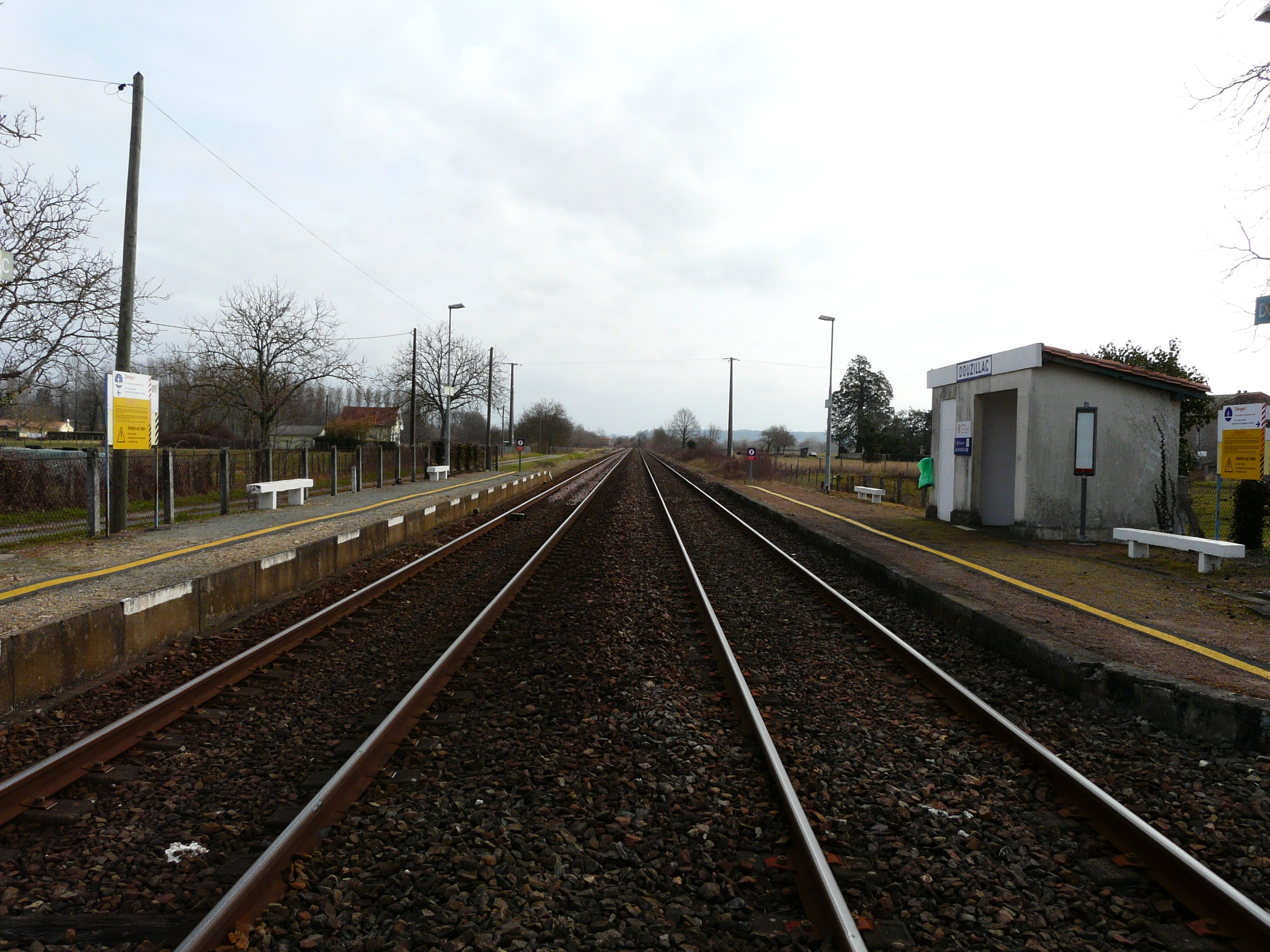 Les voies, halte ferroviaire de Douzillac, Dordogne, France.